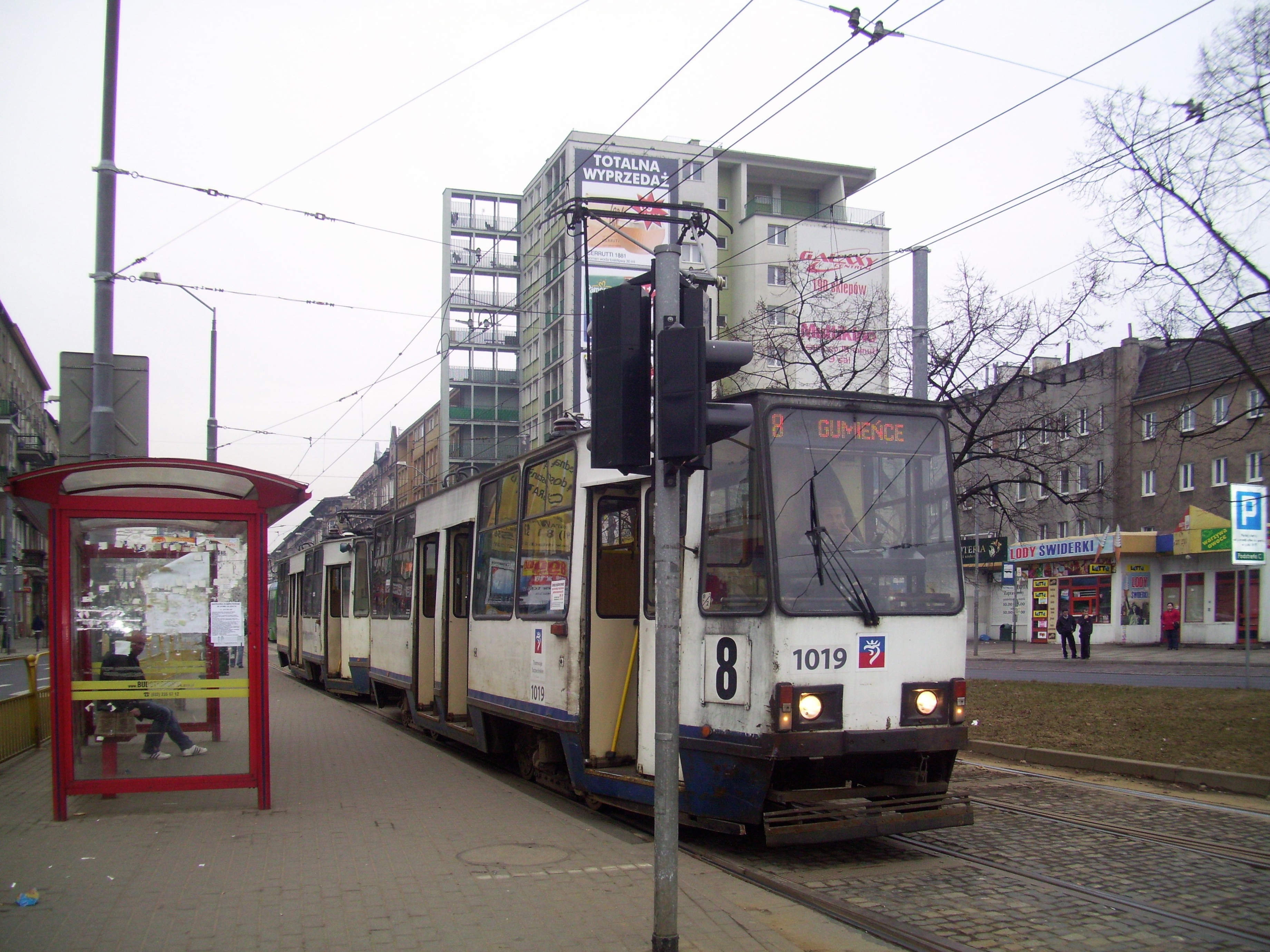 Skład wagonów Konstal 105Na o numerach 1019 oraz 1020 w Szczecinie, 2011 r.